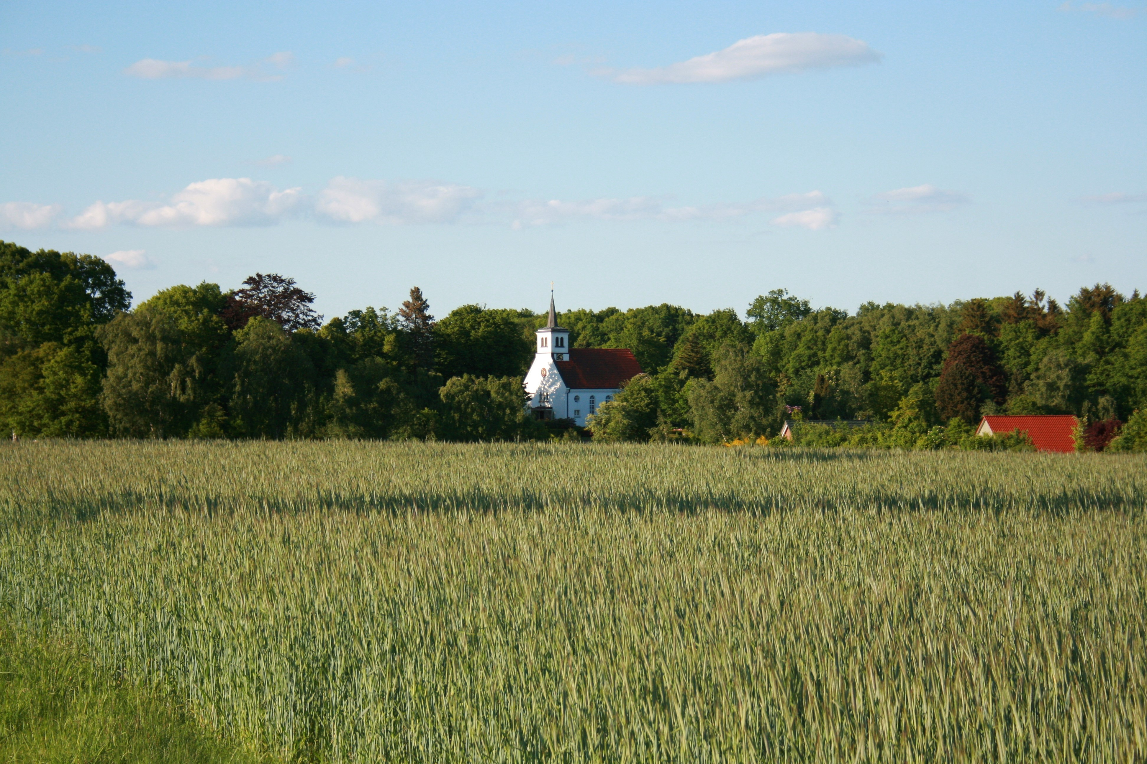 Friedenskirche Bommelsen in Bomlitz-Bommelsen